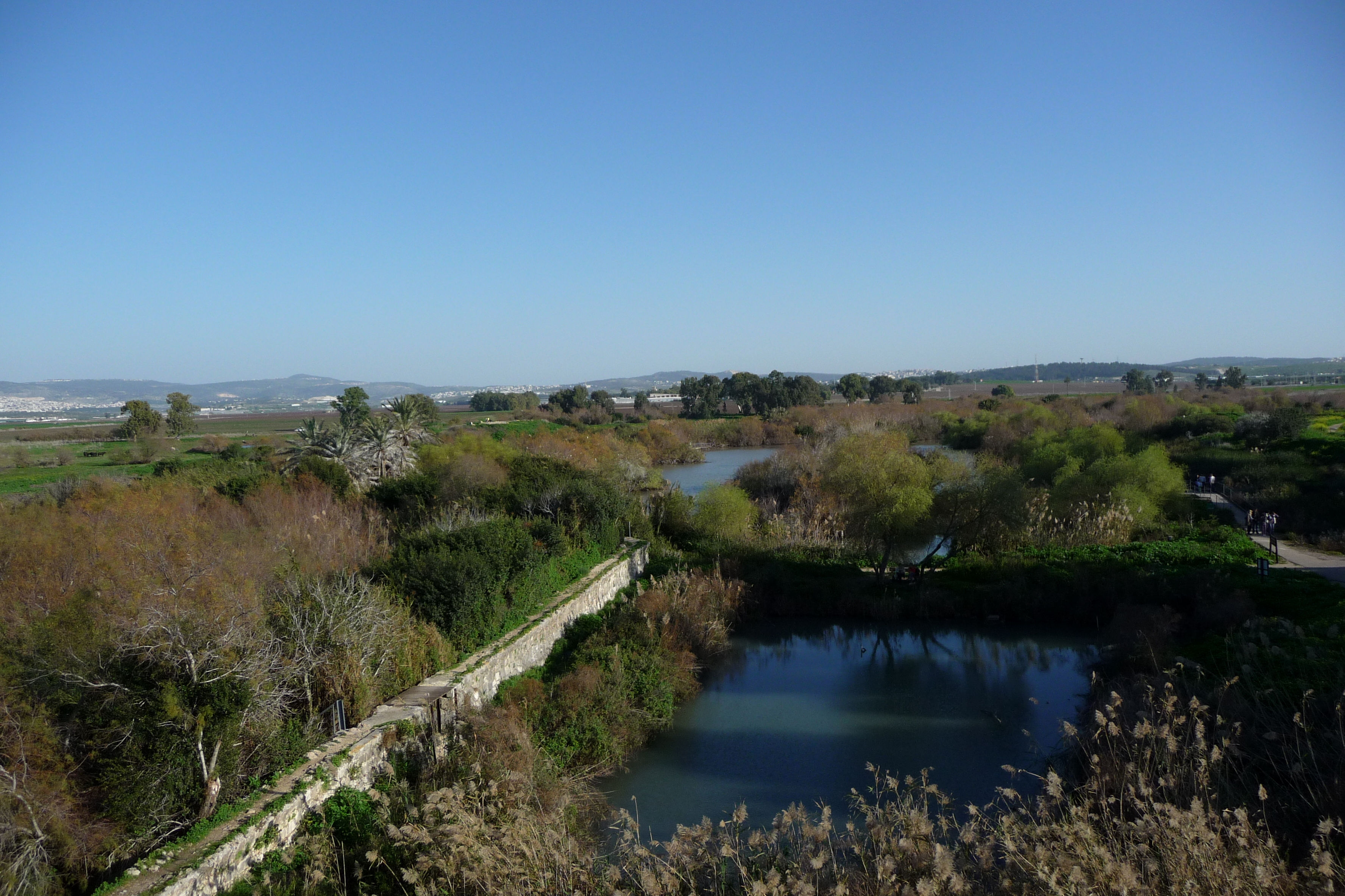 שמורת טבע בעמק זבולון, מזרחית לקריית ביאליק. השמורה כוללת הן את המעיינות והביצות המהווים את מקורו של נחל נעמן והן את האתר הארכאולוגי תל אפק. השמורה הוכרזה ב-1979 והיא משתרעת על פני 660 דונם. ב-1996 הוכרה השמורה כ"אתר רמסר" בהתאם לאמנת רמסר לשימור ולפיתוח בר-קיימא של בתי גידול לחים.